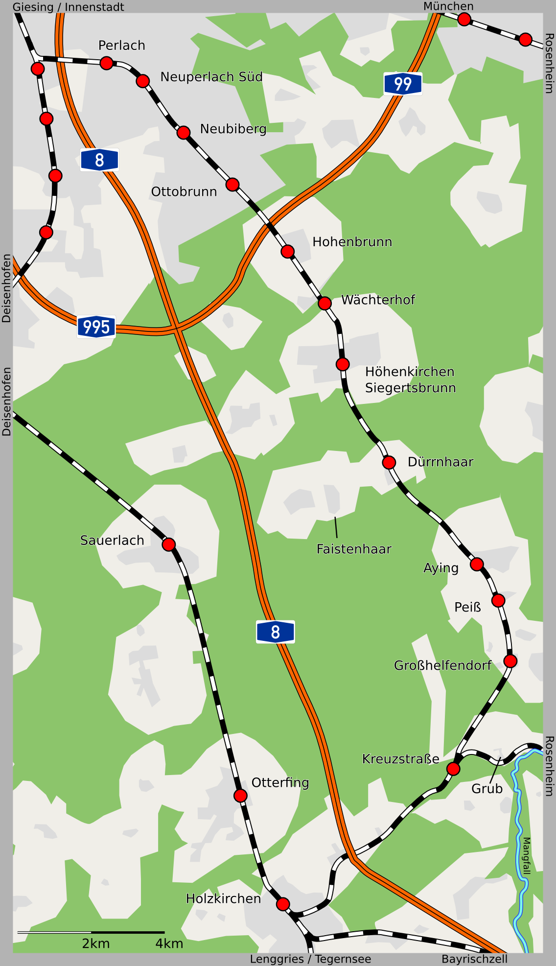 Karte der Bahnstrecke München-Giesing–Kreuzstraße